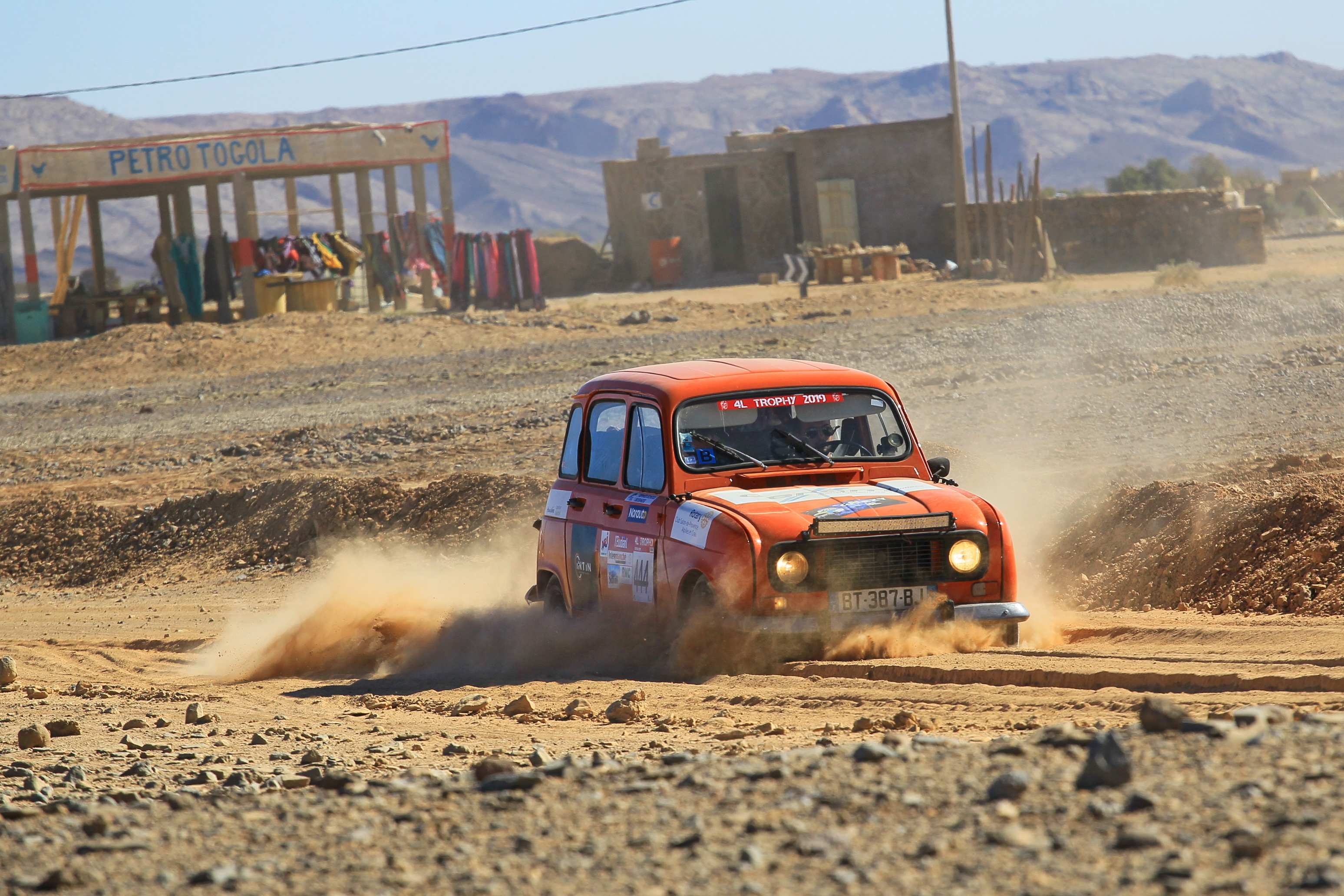 Un équipage du 4l Trophy dans le désert Marocain